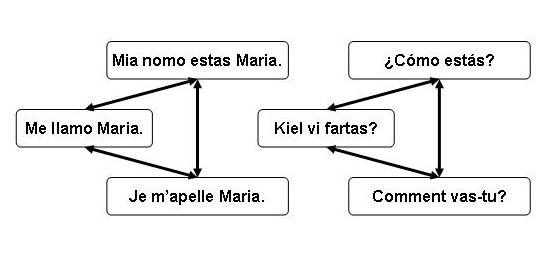 Grafea strukturo. Ĉiu nodo reprezentas frazon, kaj ĉiu eĝo reprezentas la ligilon inter du frazoj. Kiam du frazoj estas ligitaj, ili havas la saman signifon.